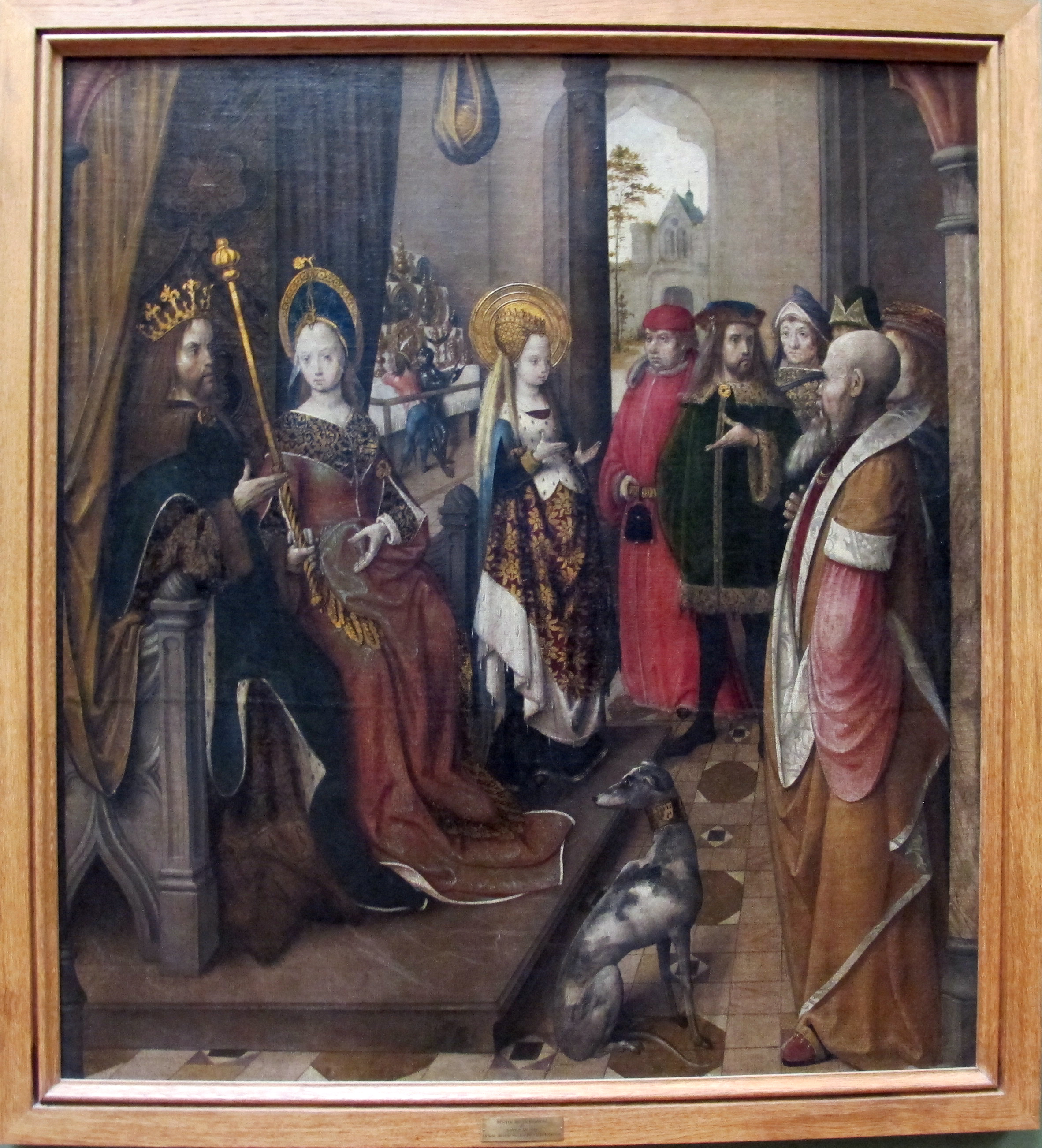 pittura tedesca al Louvre, Parigi